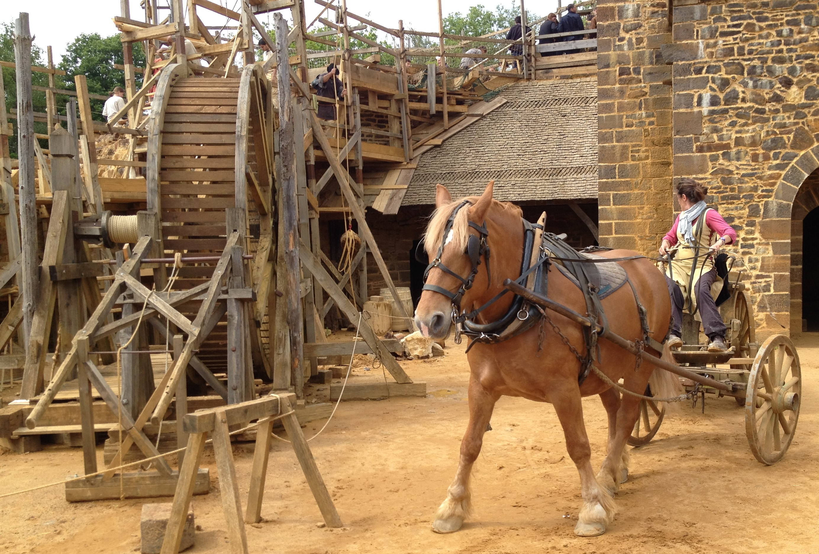 Château du Guédelon, fin mai 2014.